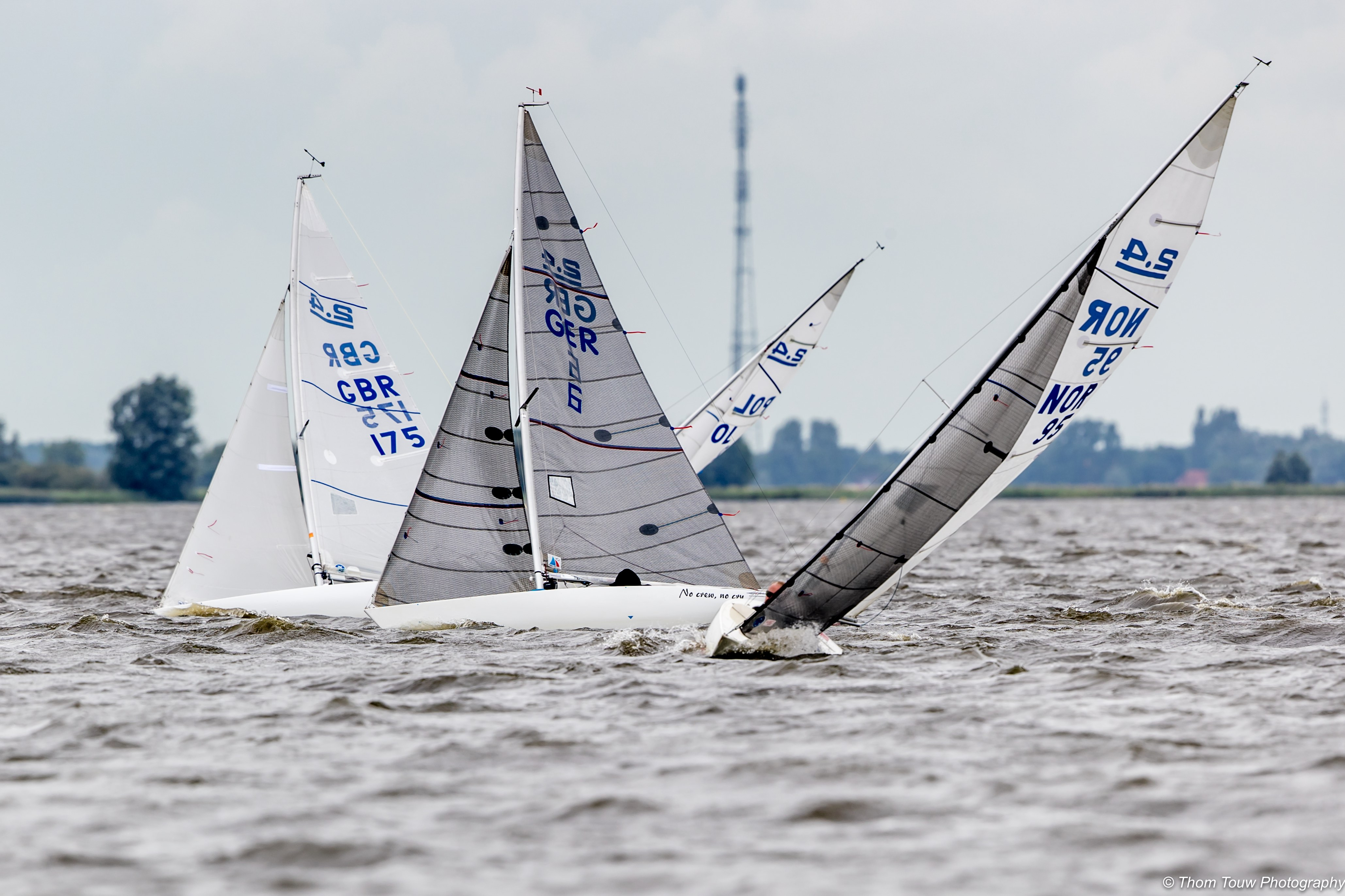 Weltmeisterschaft Sneek Niederlande 2017